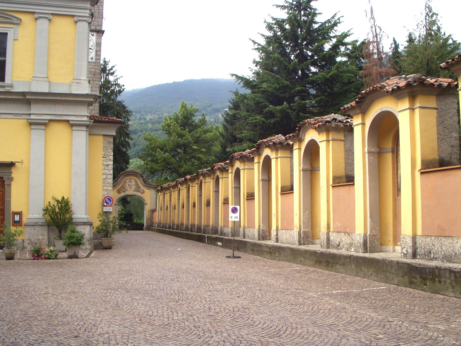 Monasterolo del Castetllo chiesa di San Salvatore via crucis - mosaici realizzati su disegno di Trento Longaretti